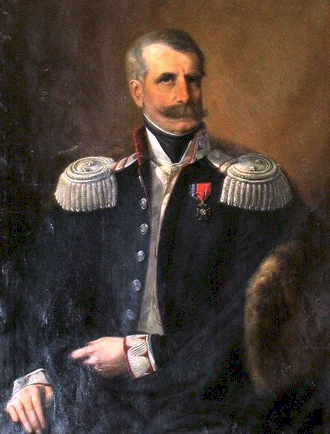 Dezydery Chłapowski